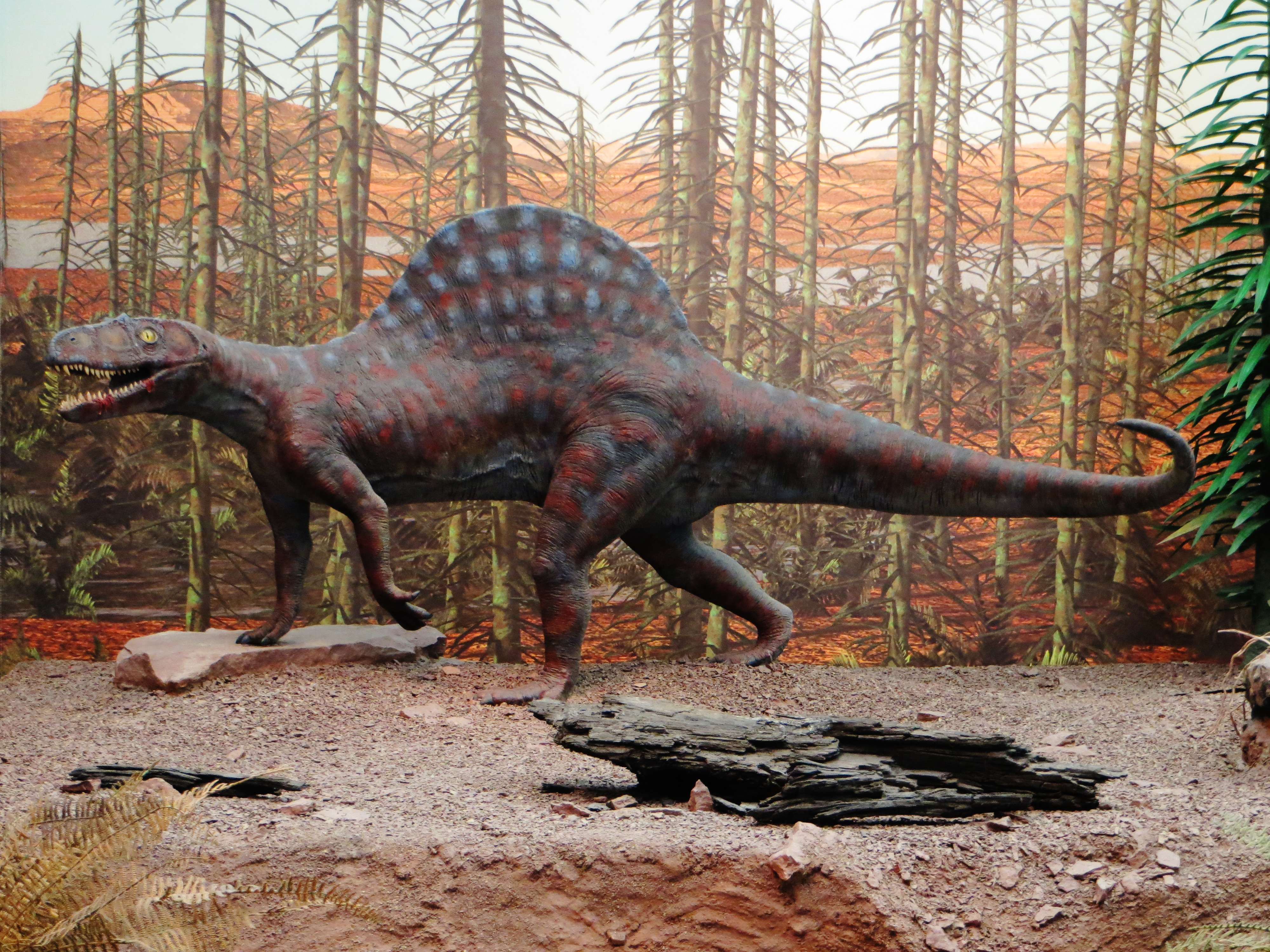 Model of the ctenosauriscid Arizonasaurus - Took the picture at Museum am Lowentor, Stuttgard